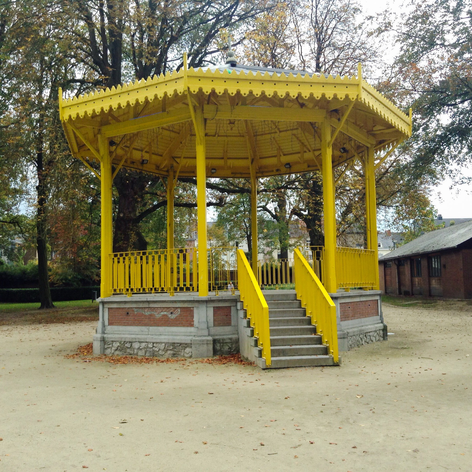 Kiosque à musique du Parc Romantique de la ville d'Ath (Belgique).